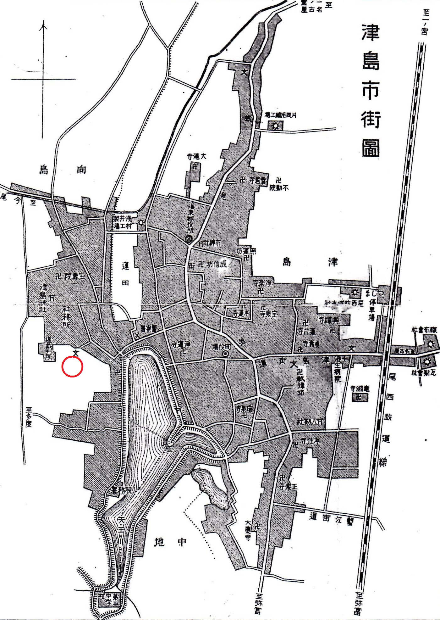 1910年（明治43年）に海東郡役所が発行した『海東郡全圖』における『津島市街圖』。1935年から2000年まで南門前町にあった津島市立図書館の位置を赤丸で記した。